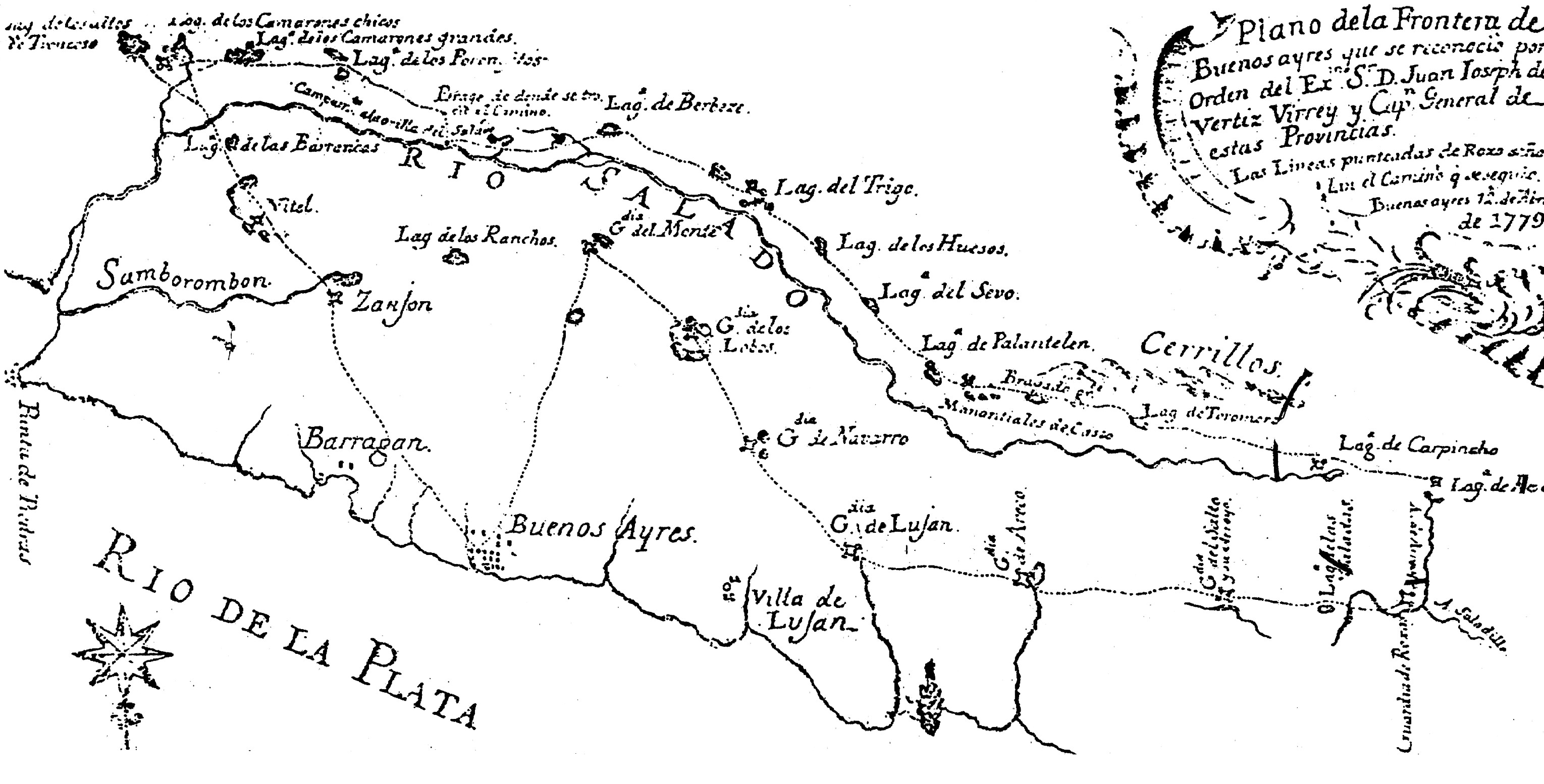 Plano de la expedición de Francisco Betbezé, en 1779, a la zona del río Salado, actual provincia de Buenos Aires, Argentina.